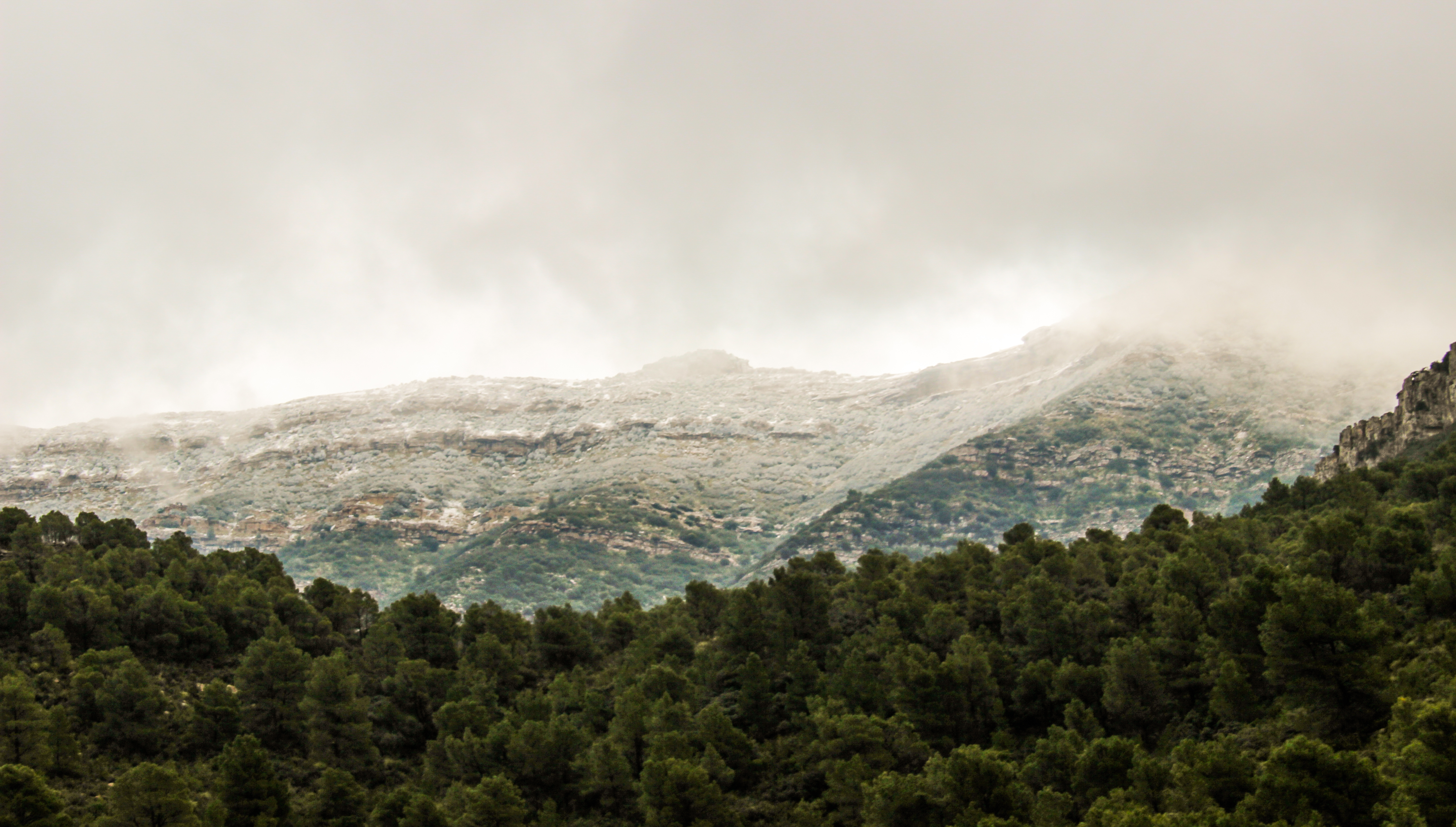 Parc national de Jebel Serj